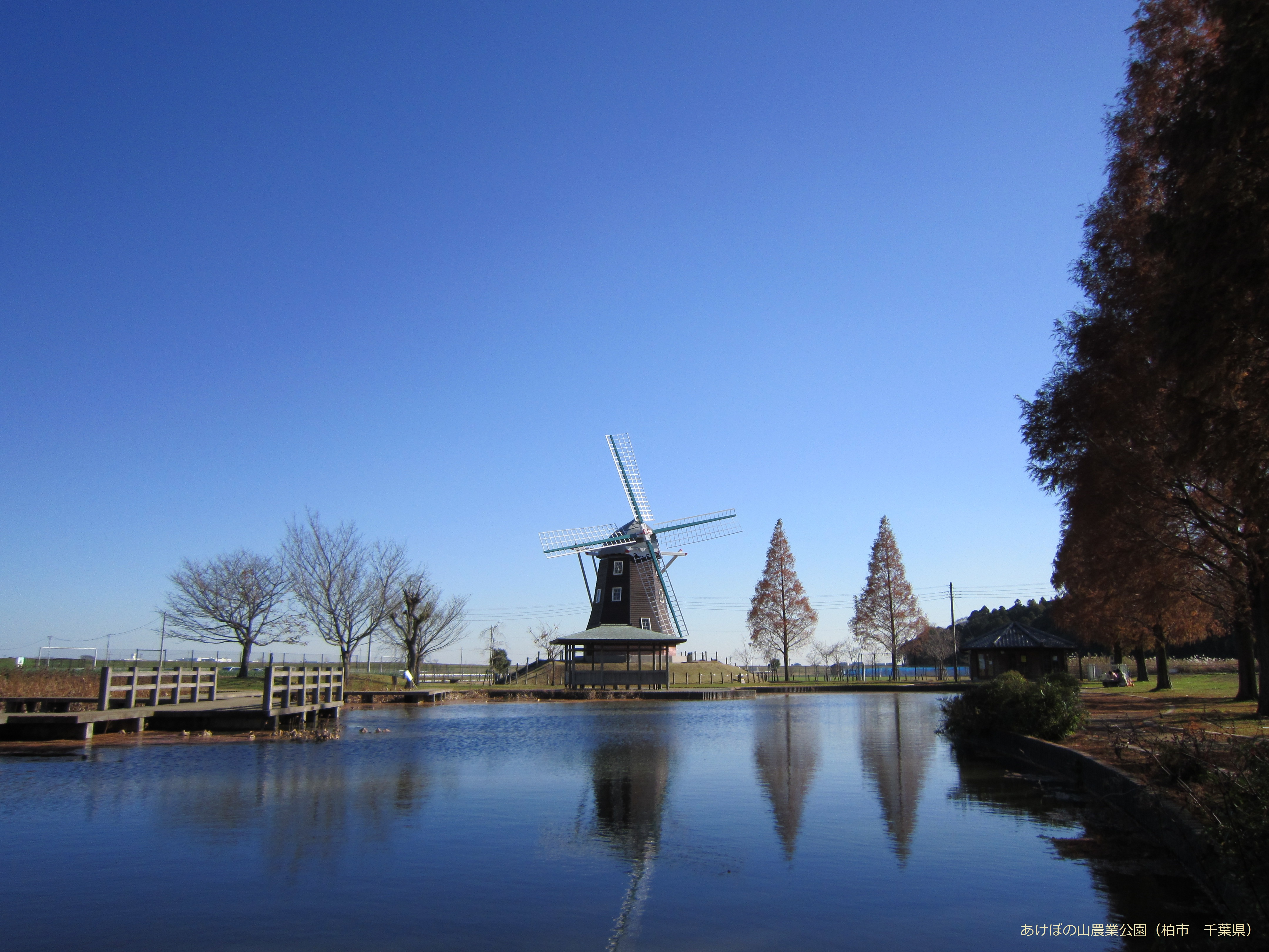 あけぼの山農業公園（柏市）